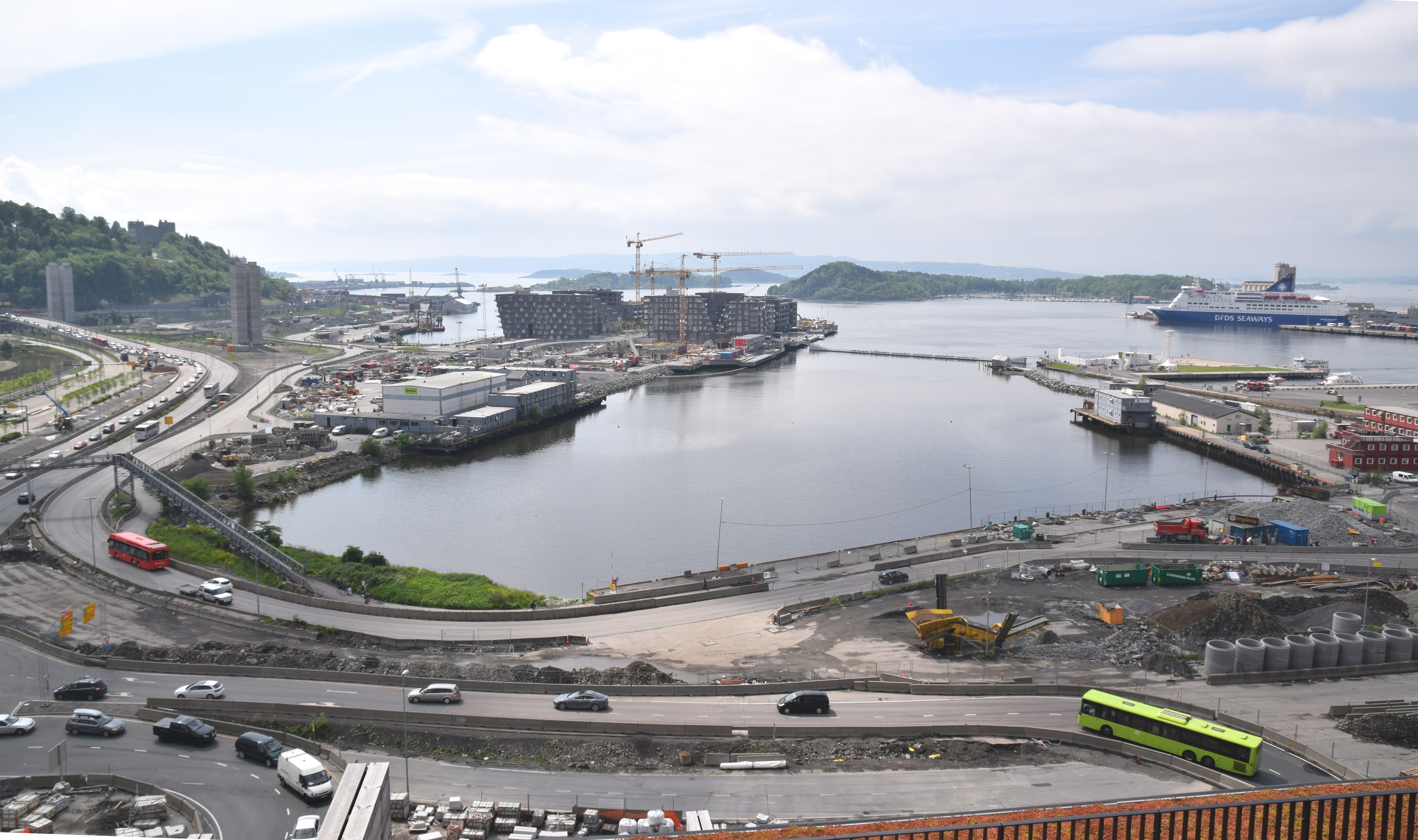 Bispevika, ligger øst for for Bjørvika og regnes ofte med til Bjørvika-området. Øst for Bispevika ligger Kong Håkon 5.s gate og Middelalderparken. Bilde tatt fra 7. etasje i Rostockgata 7 i Barcode